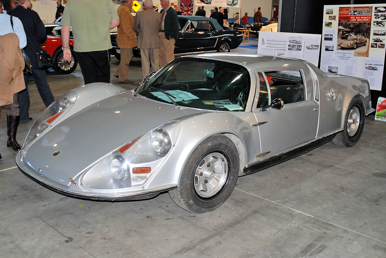 mid-engined sportscar, made in Belgium by Application Polyester Armé de Liége; left front-side view